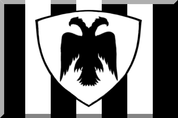 Φανταστική απεικόνιση του βυζαντινού αετού